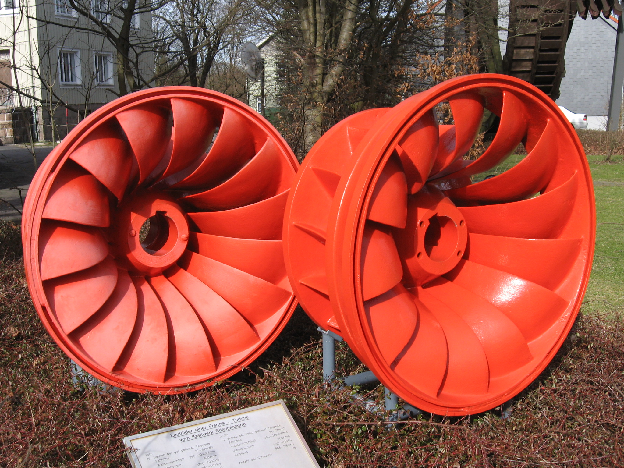 Laufräder einer Francis-Turbine vom Kraftwerk Sösetalsperre (Niedersachsen, Deutschland). Baujahr 1932, Werkstoff Stahlguss rechts: für den Betrieb bei gut gefüllter Talsperre, Fallhöhe: 37–54 mWS, Wasserdurchfluss: 250–205 m³/min, Umdrehungen: 500 1/min, Leistung: 1750–2000 PS, 13 Schaufeln links: für den Betrieb bei wenig gefüllter Talsperre, Fallhöhe: 24–37 mWS, Wasserdurchfluss: 300–246 m³/min, Umdrehungen: 500 1/min, Leistung: 1180–1720 PS, 15 Schaufeln